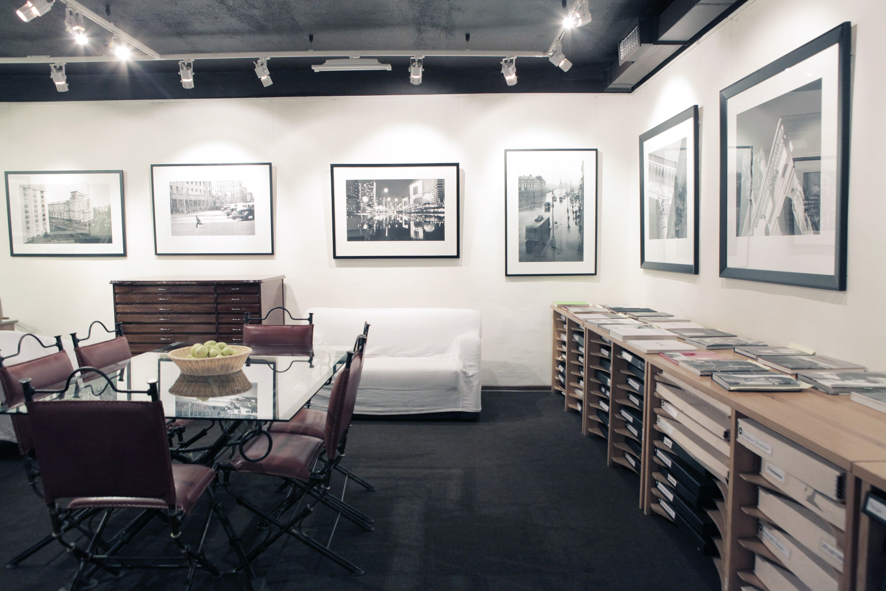 Галерея имени братьев Люмьер, отдел советской фотографии